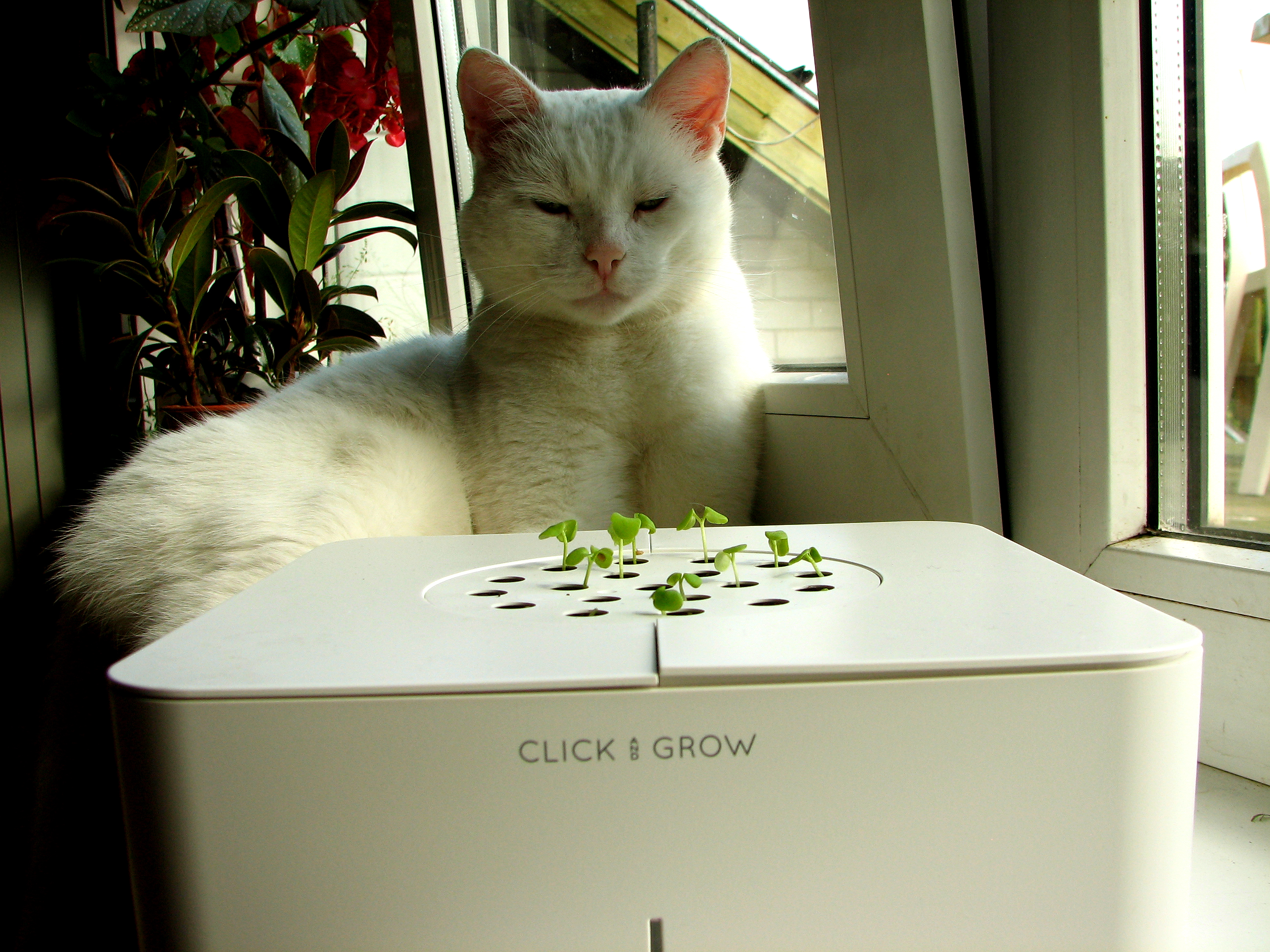 Eestlaste leiutatud Click and Grow kõrgtehnoloogiline lillepott